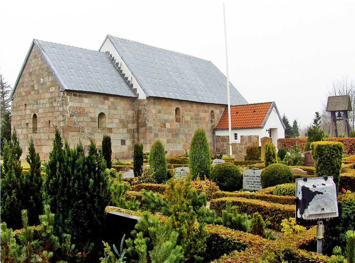 fra nordøst